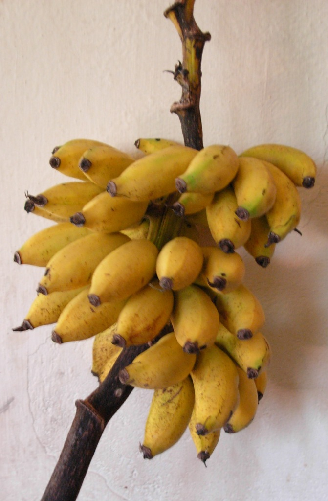 പഴുത്ത കദളിവാഴക്കുല.